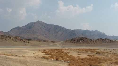 صورة لجبل حبيش من الجهة الشمالية